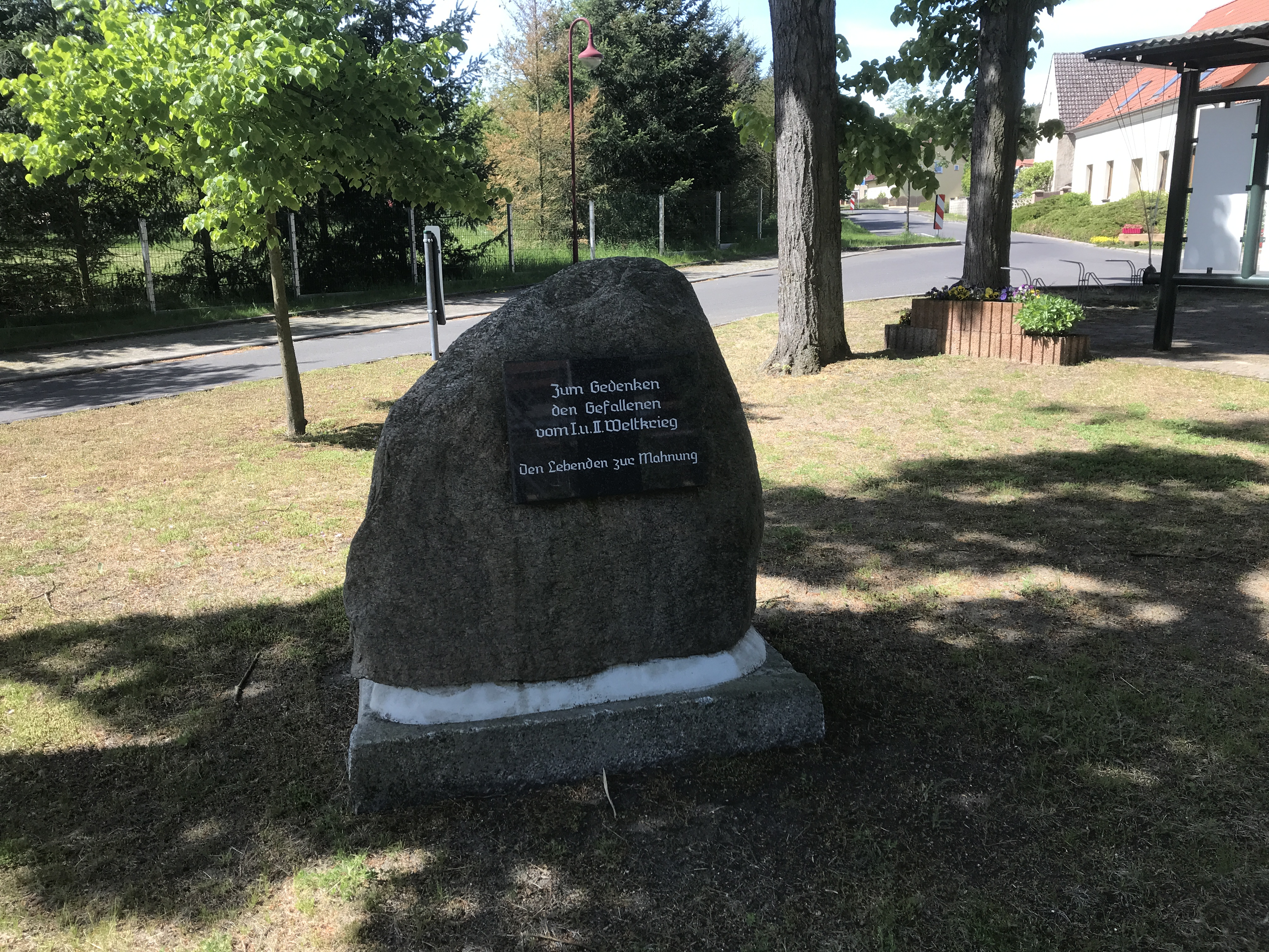 Dorfanger in Kolpin, ein Ortsteil der Gemeinde Reichenwalde in Brandenburg.